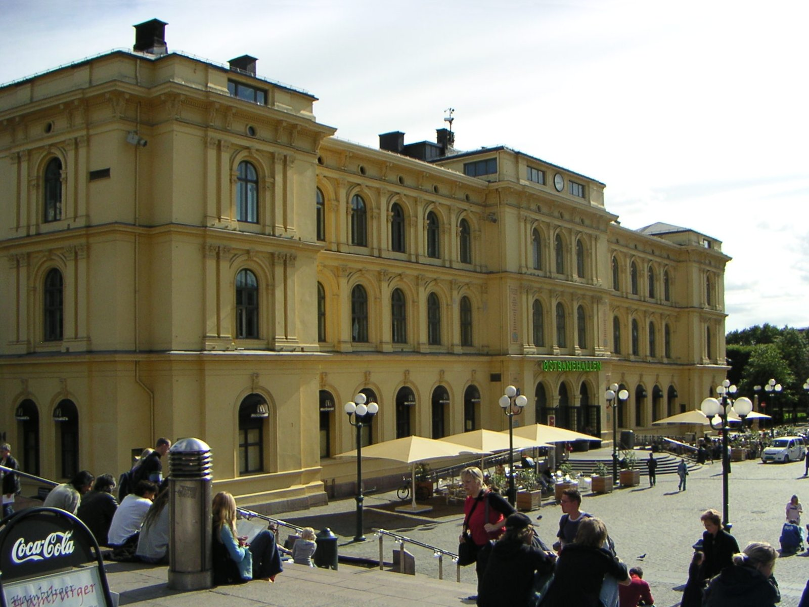 Oslo Østbanestasjon, now replaced by Oslo Sentralstasjon.